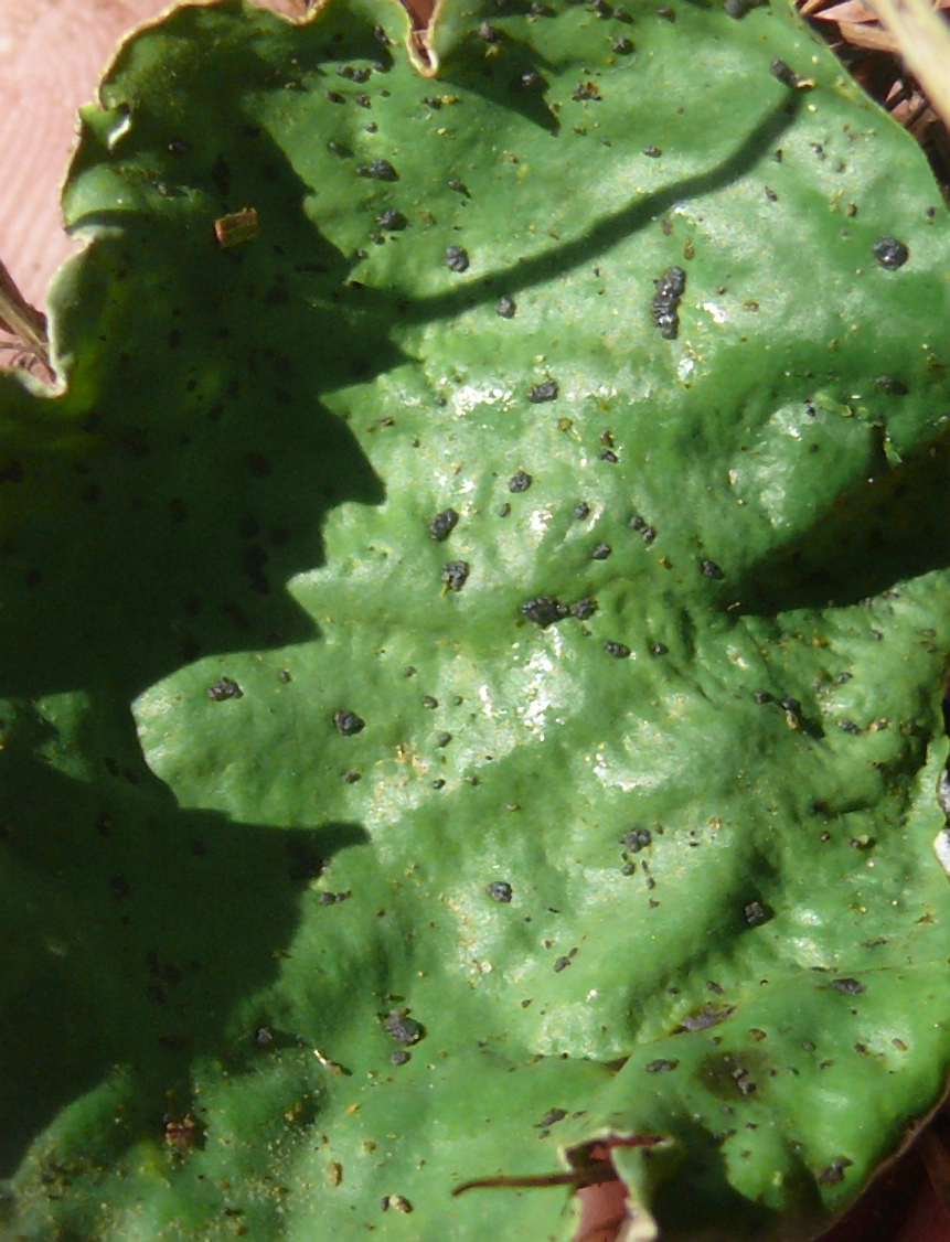 Peltigera leucophlebia, Zillertaler Alpen, Italien